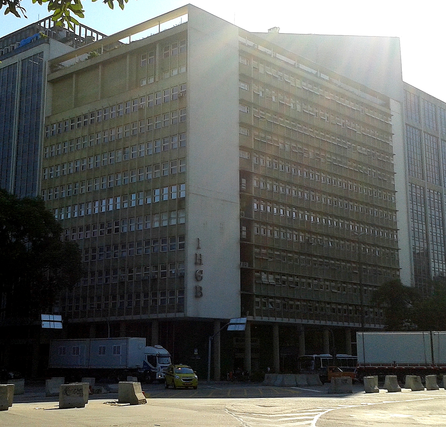 Sede do Instituto Histórico e Geográfico Brasileiro (IHGB) no centro do Rio de Janeiro (RJ, Brasil).